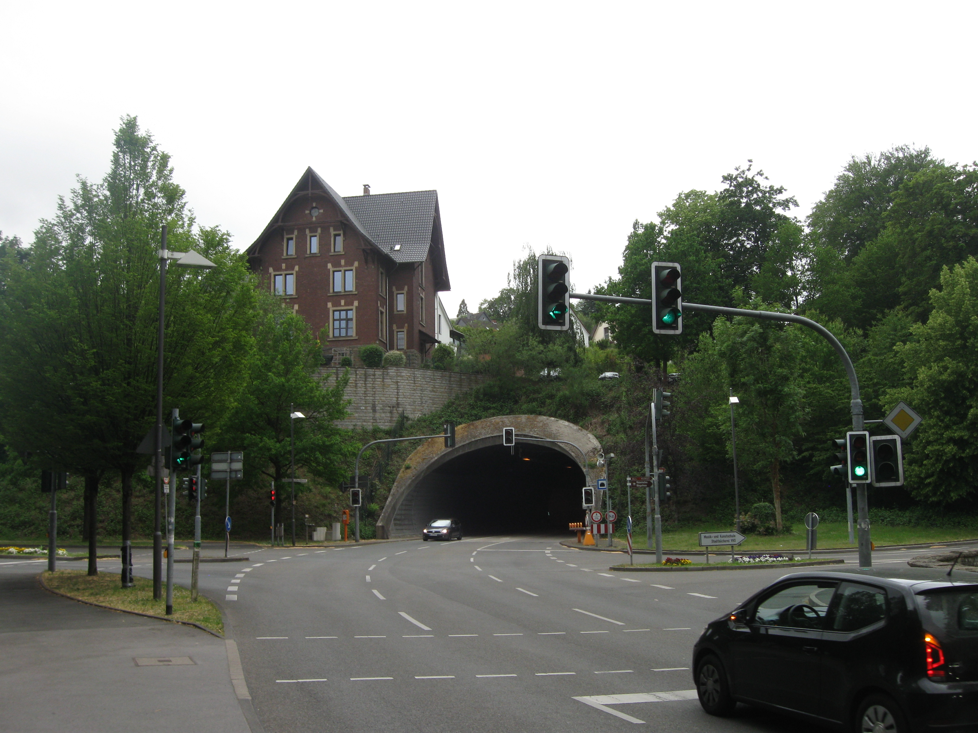 Tunnel Langenberg (Osttor)